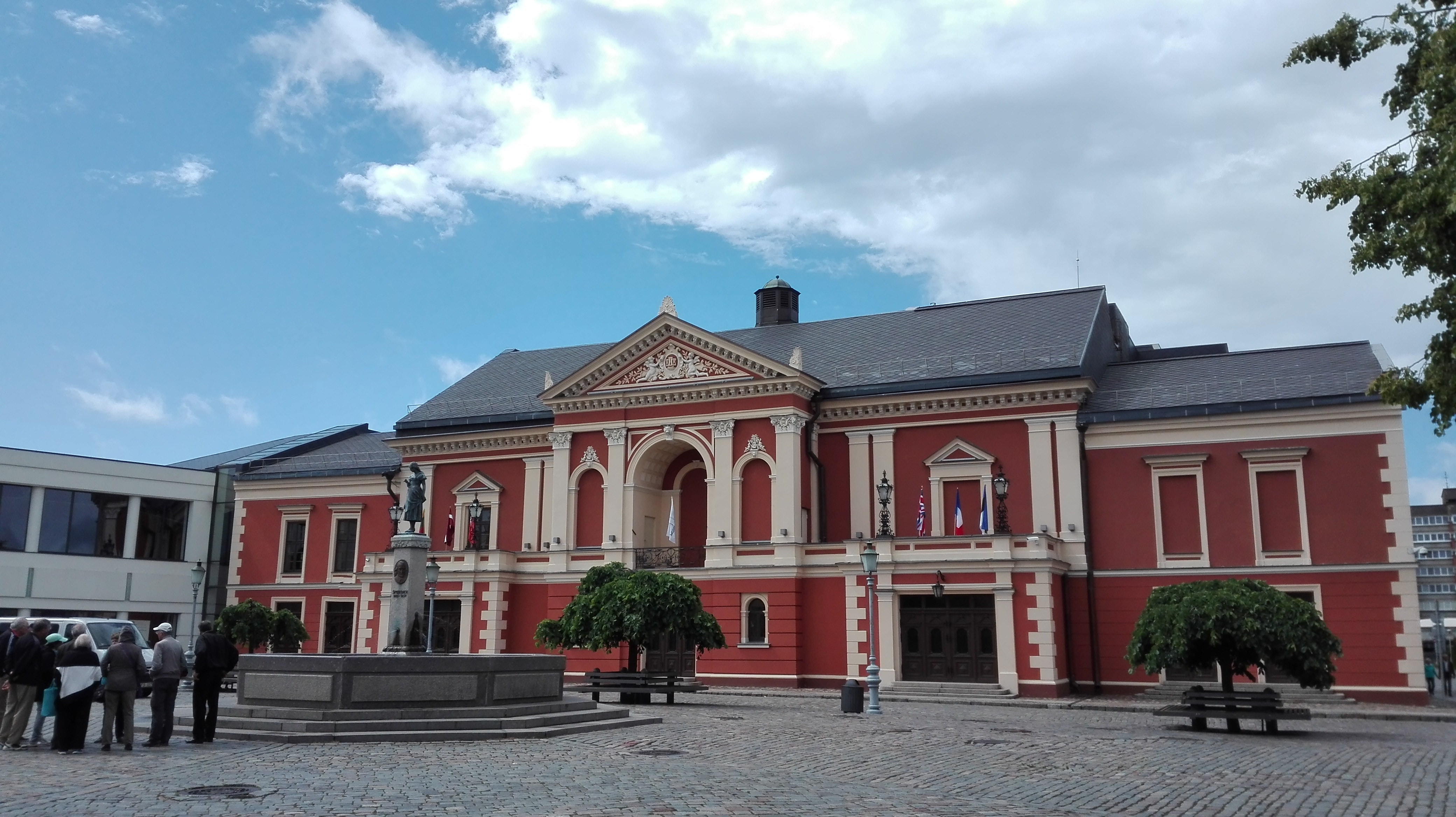 Teatro aikštė, Klaipėda